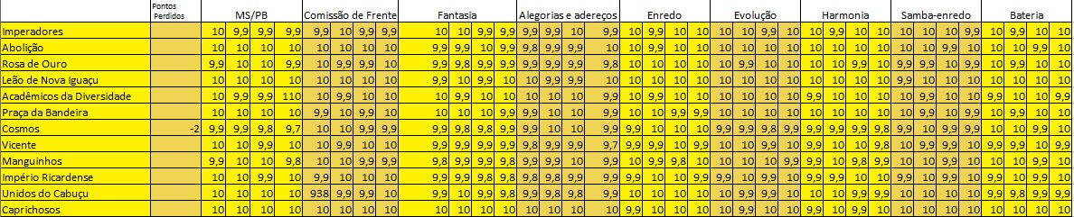 Resultados do Carnaval do Rio em 2020 - Grupo de acesso da Intendente